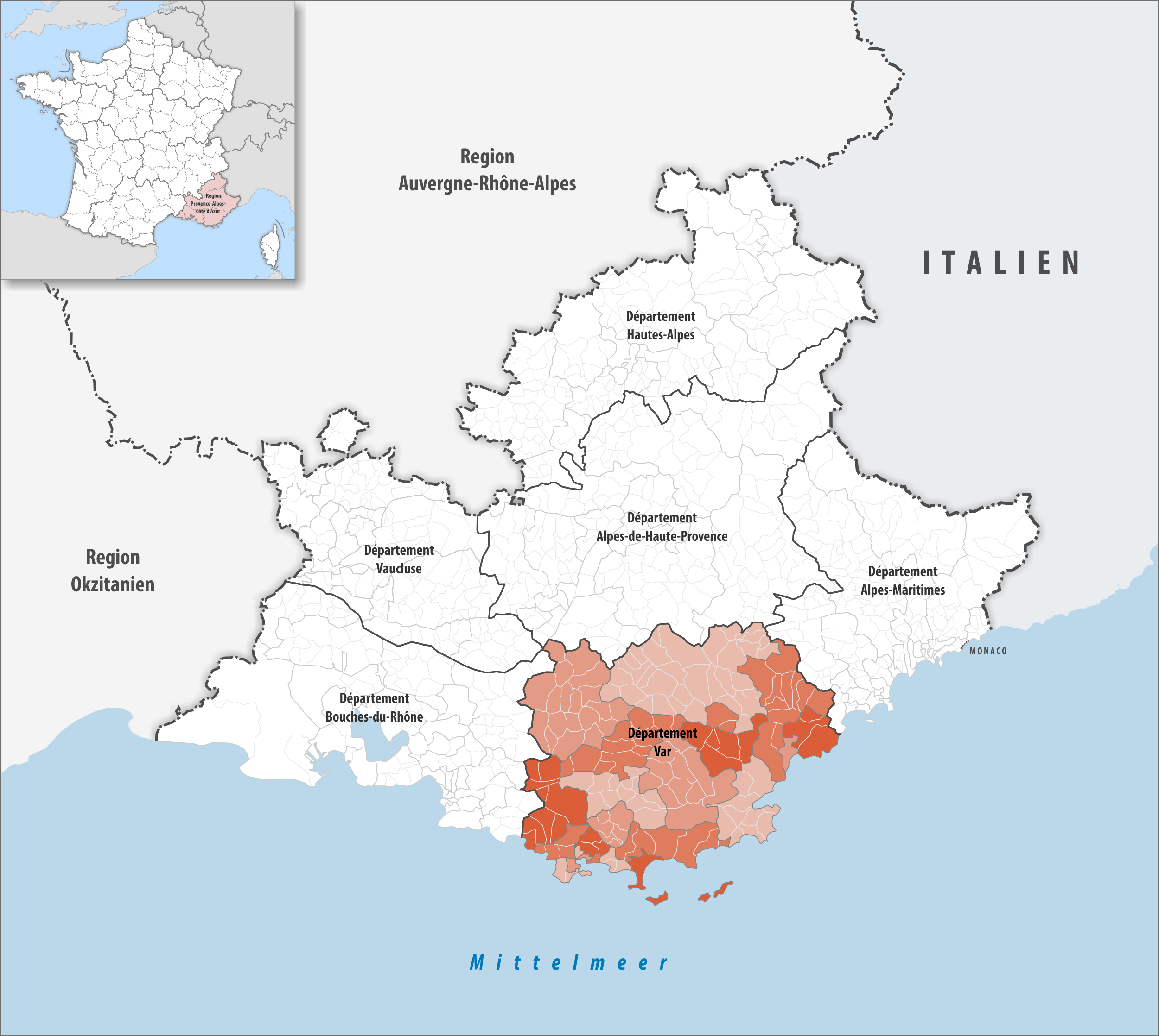 Lage des Departements Var